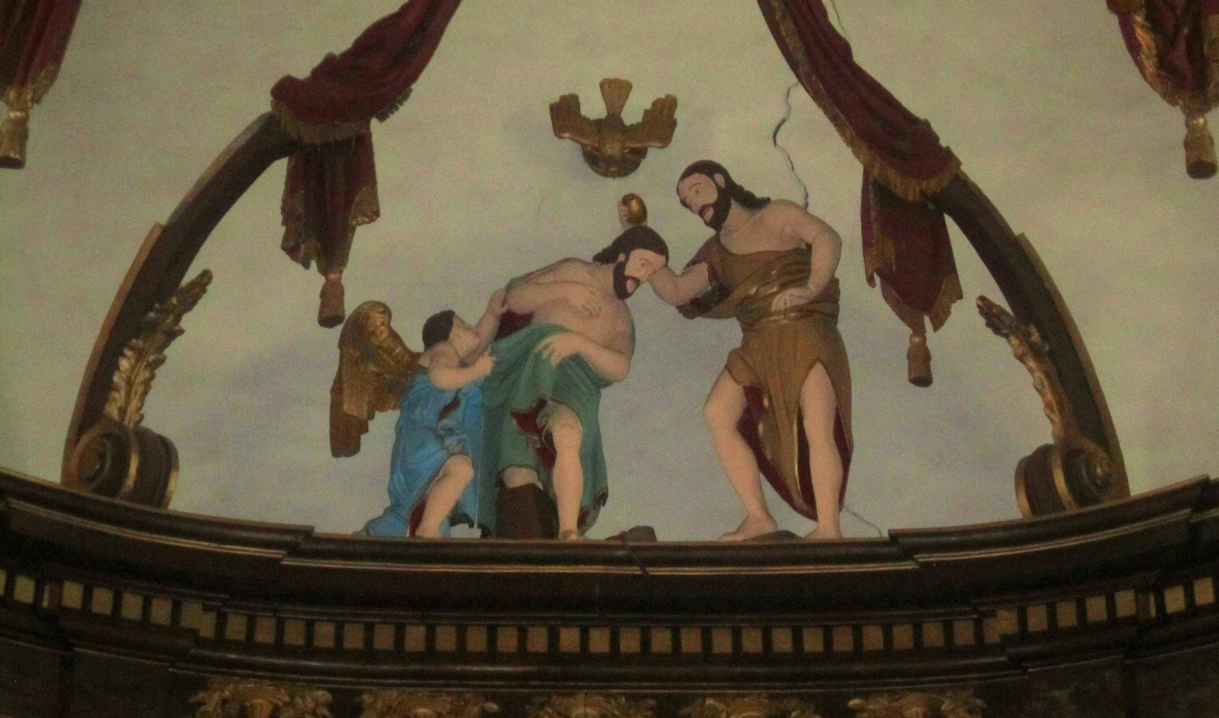 Groupe représentant le baptême du Christ. Classé aux Monuments historiques. Eglise de Villard-sur-Boëge